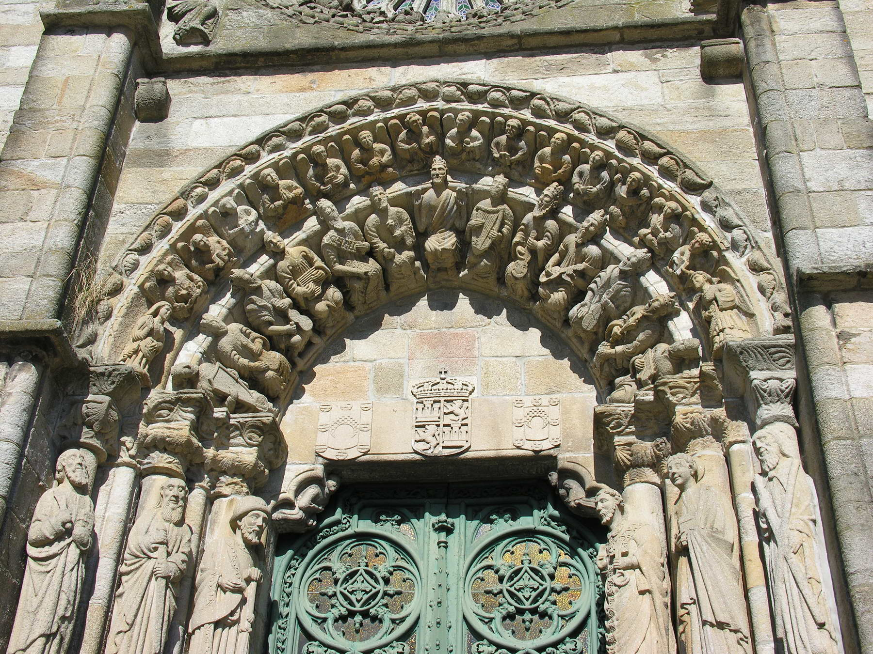 Entrada da igrexa principal de Noia, Galicia. Publish by= Luis Miguel Bugallo Sánchez.